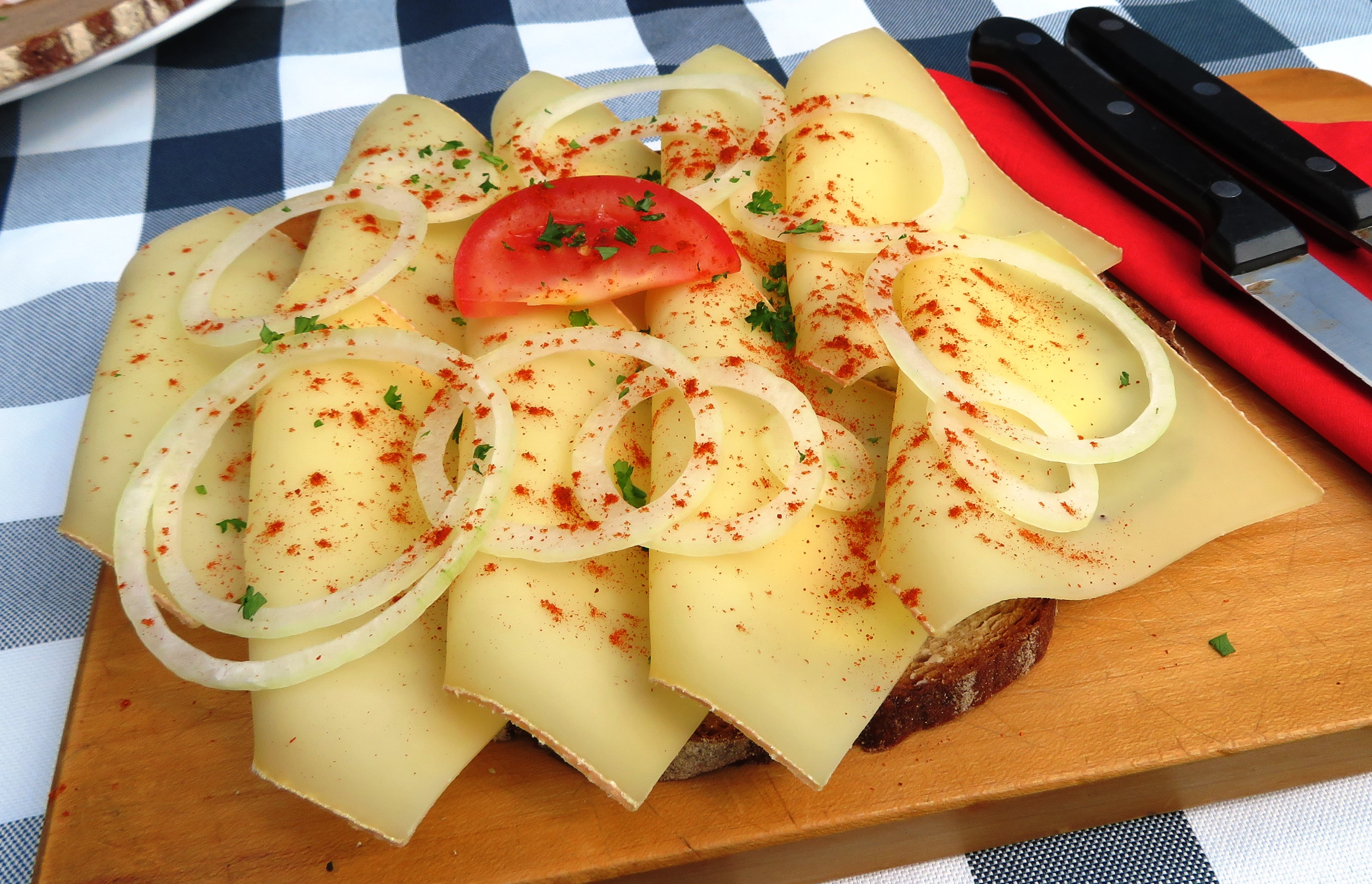 Bergkäsebrot